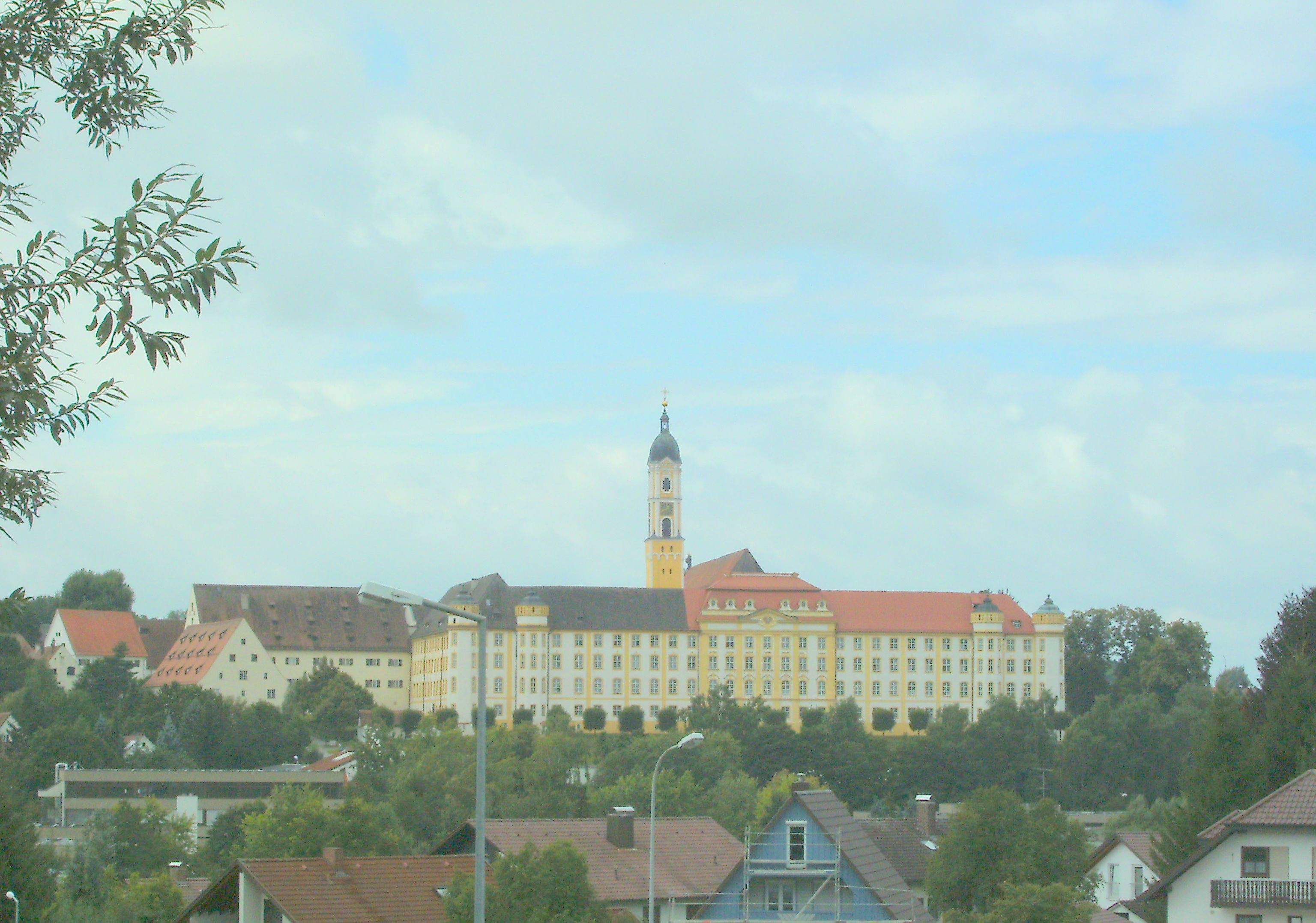 Kloster Ochsenhausen - Beton-Flachdachbau links das Gymnasium Ochsenhausen